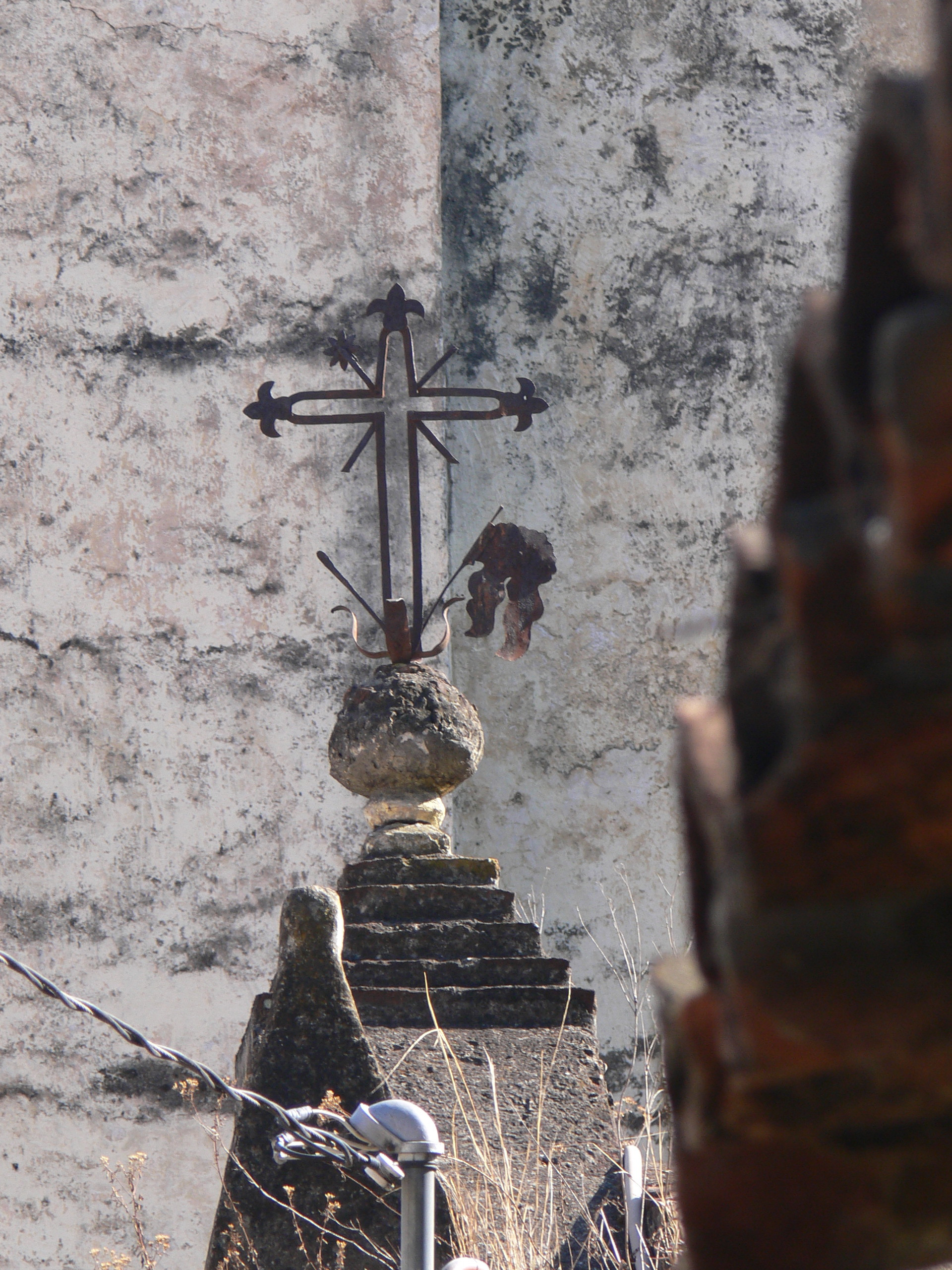 San Cristobal de las Casas. Iron Cross at the Templo de la Caridad